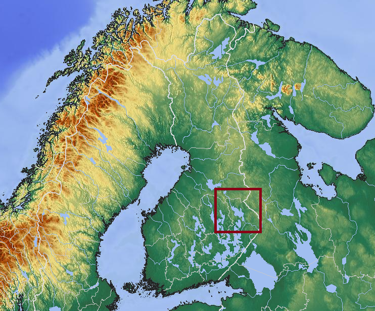 Map of Pieninen lake, Finland